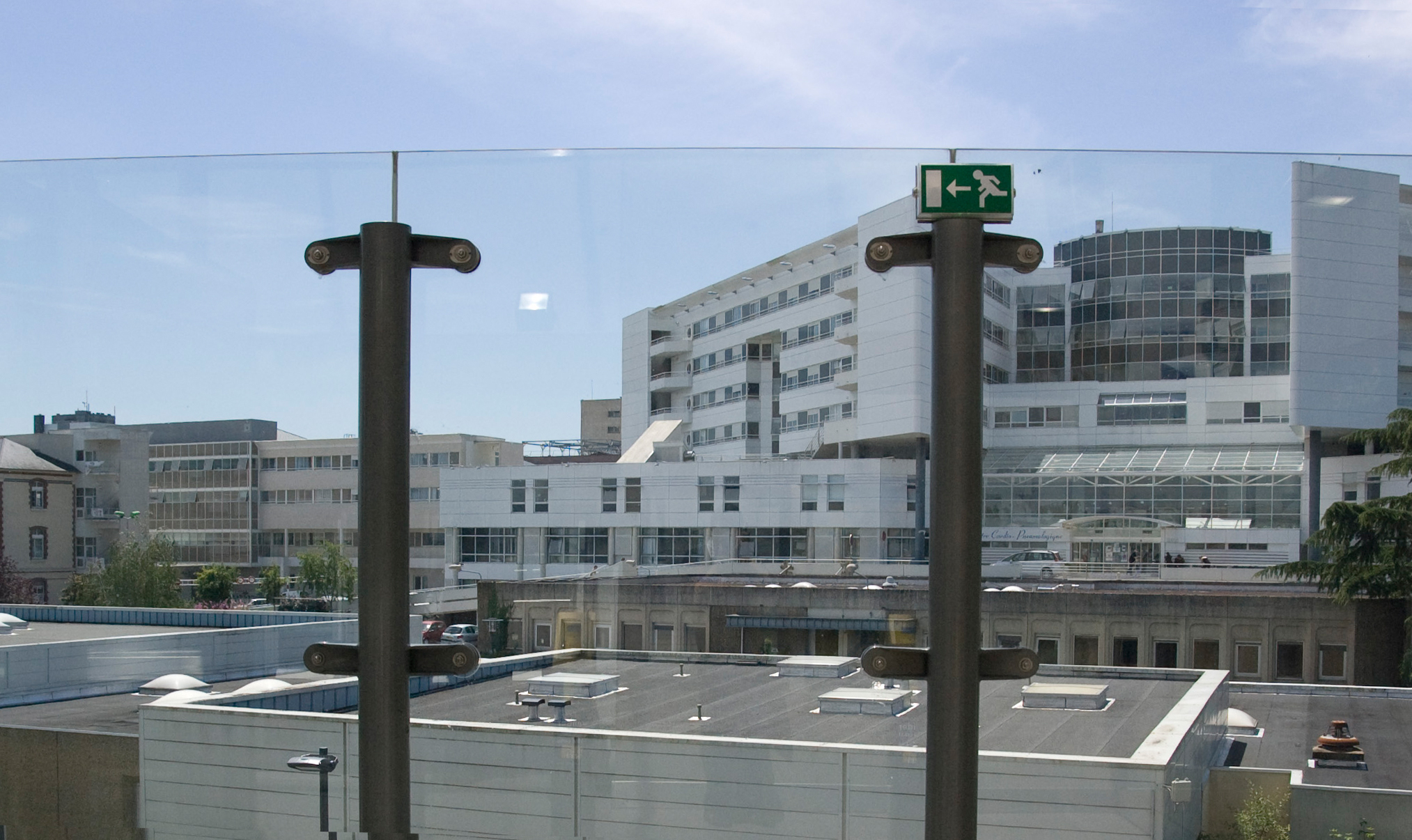 Site de l'Hopital Ponchaillou, CHU de Rennes.